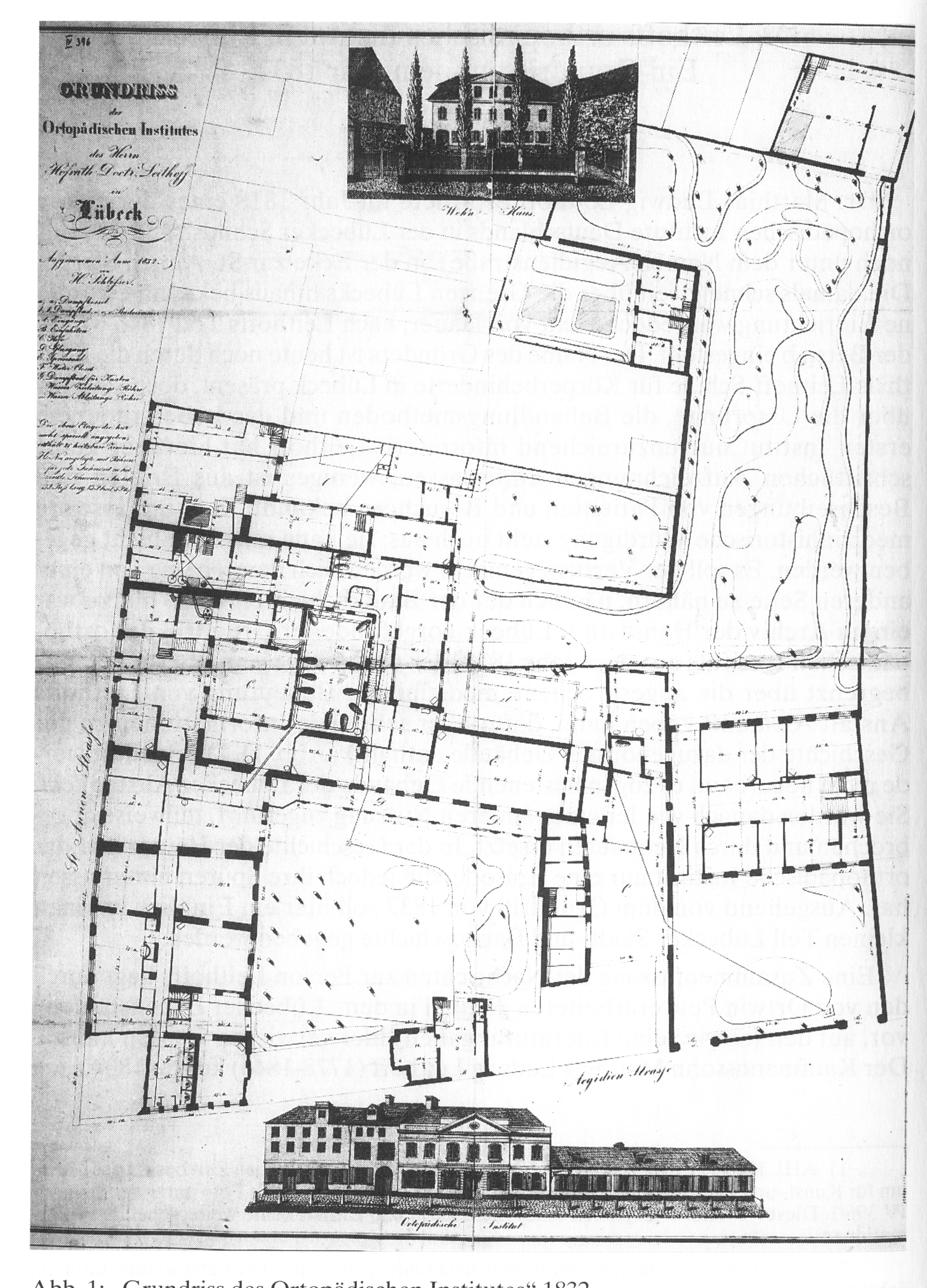 Dr. Leithoffs orthopädisches Institut in Lübeck. Grundriß aus dem Jahr 1832